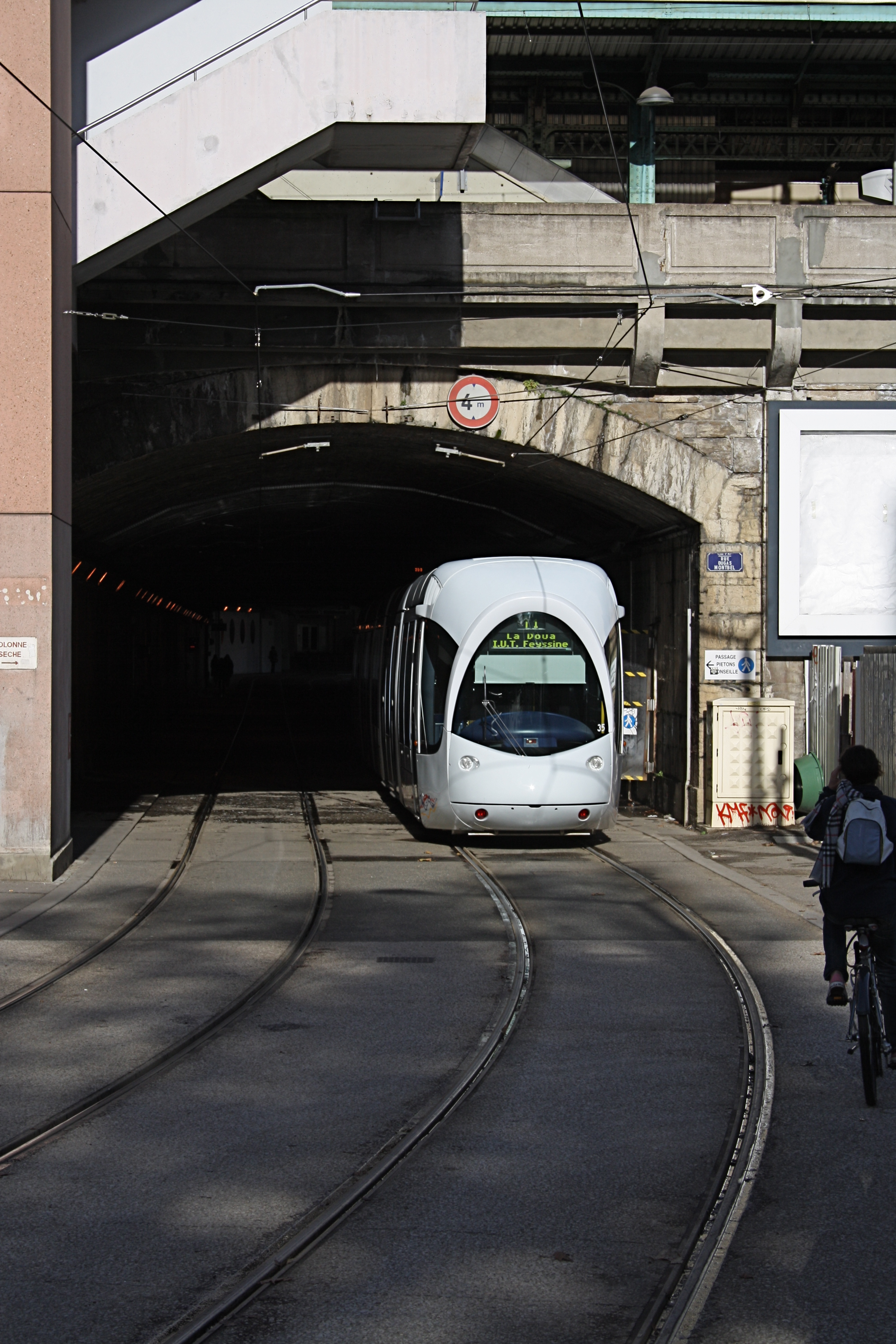 Tramway passant sous la gare de Lyon-Perrache